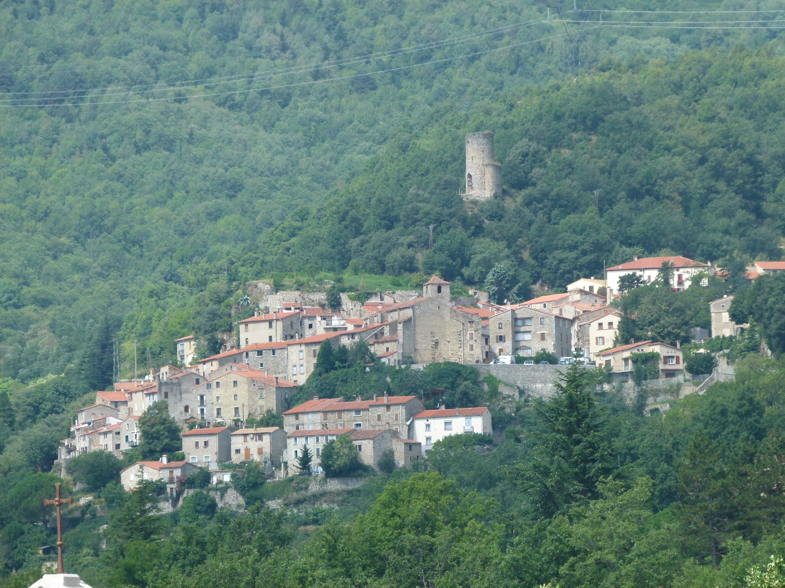 Vista des de St. Martí de Cortsaví (Alt Vallespir)